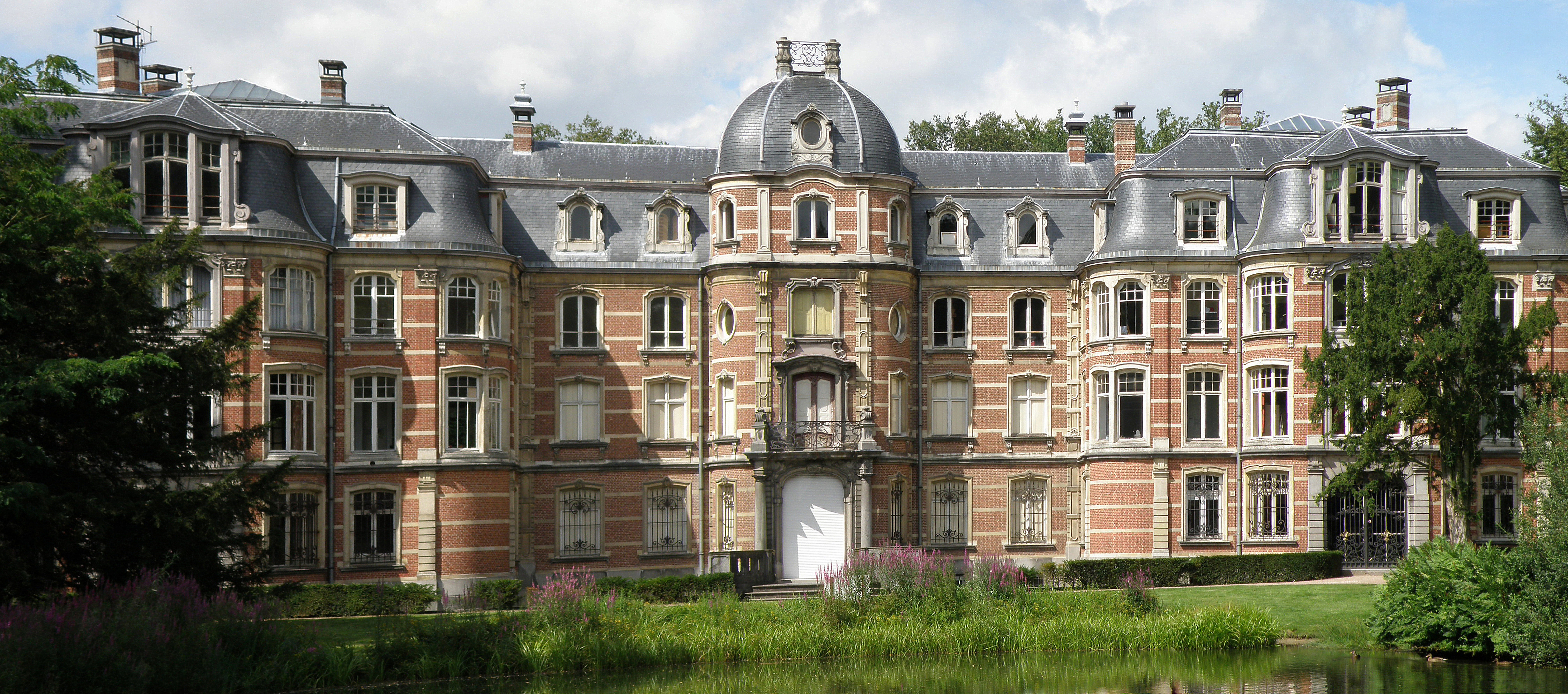 Stabroek, comm. dans la prov. d'Anvers (Belgique), à la frontière hollandaise. Château Ravenhof, de style néo-rococo, édifié pour partie début XIXe, pour partie début XXe. Arch. Fr. Stuyck. Parc s'étendant de part et d'autre de la frontière. Gloriette en territoire hollandais. Sur la photo : façade sud (arrière, côté jardin).